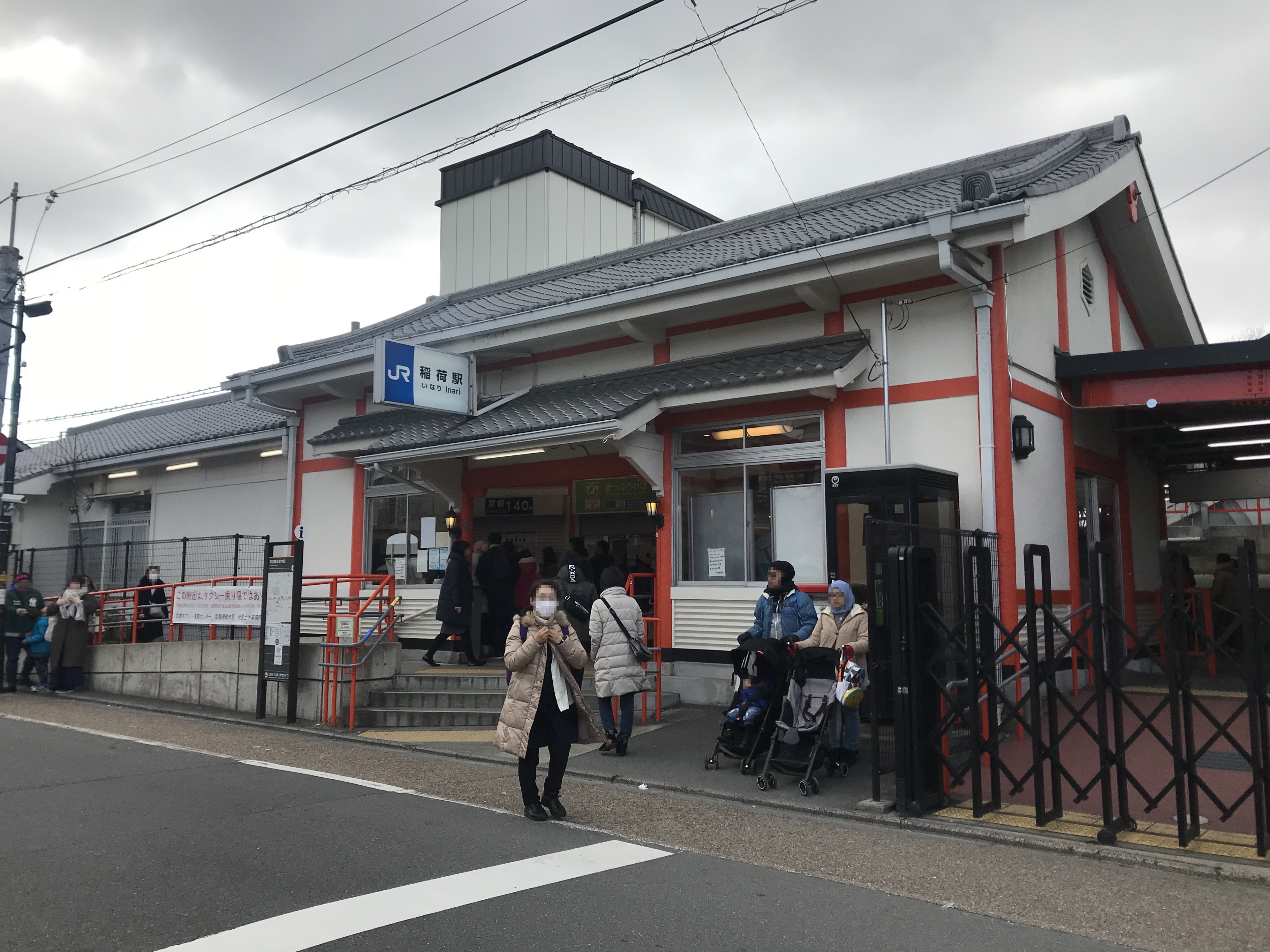 稲荷駅の駅舎